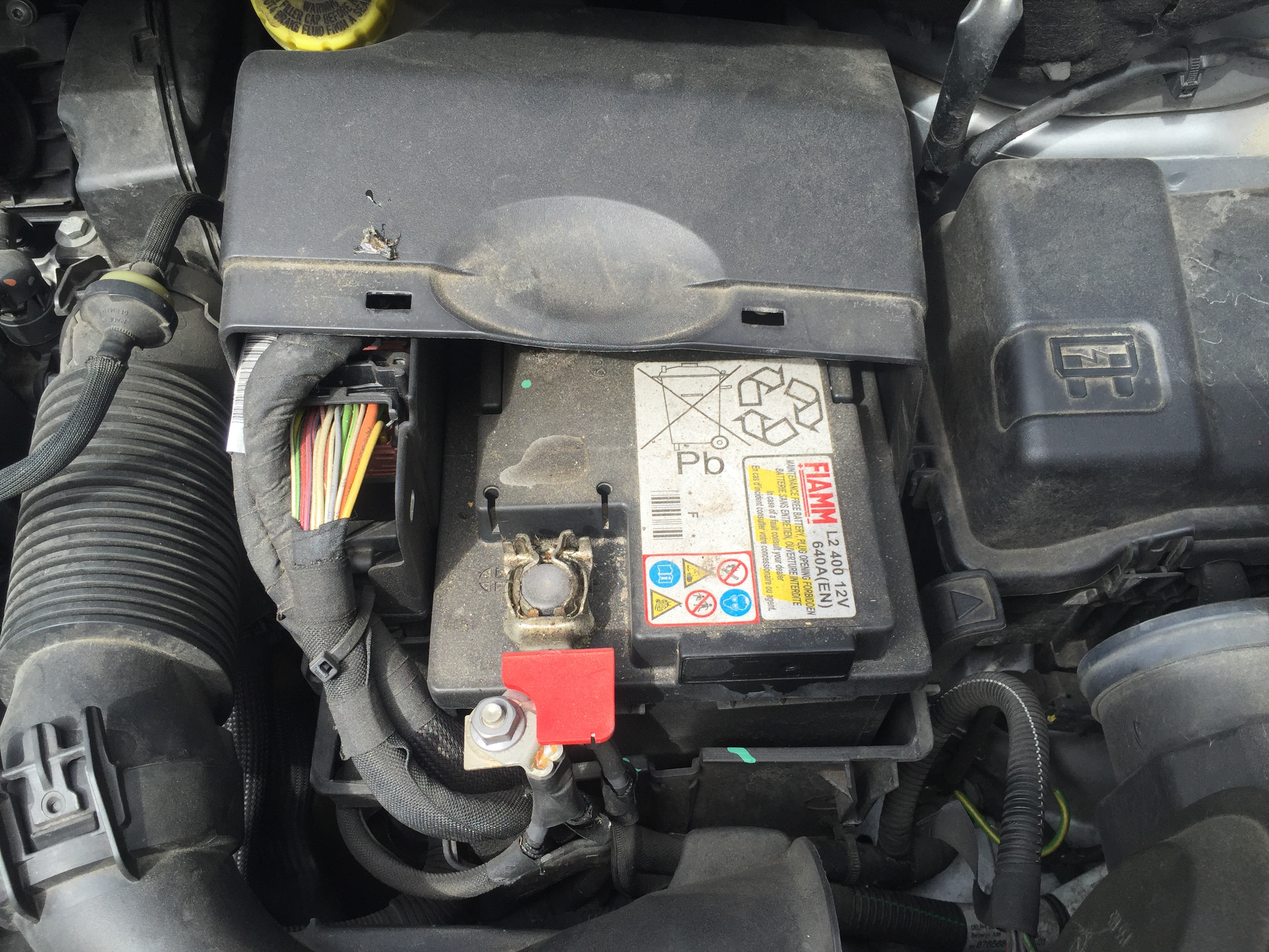 Batterie de C3 Picasso.